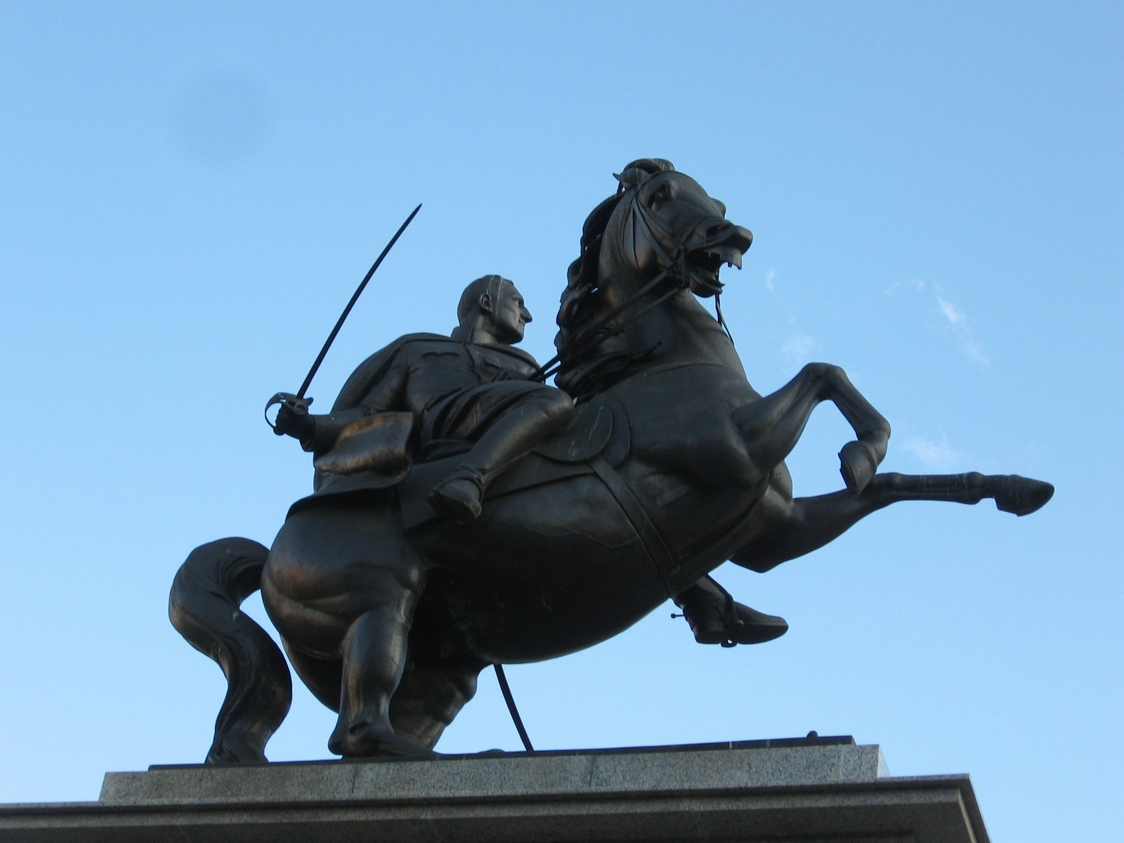 Споменик Краљу Александру на Тргу Краља Александра. Снимљено у априлу 2010.